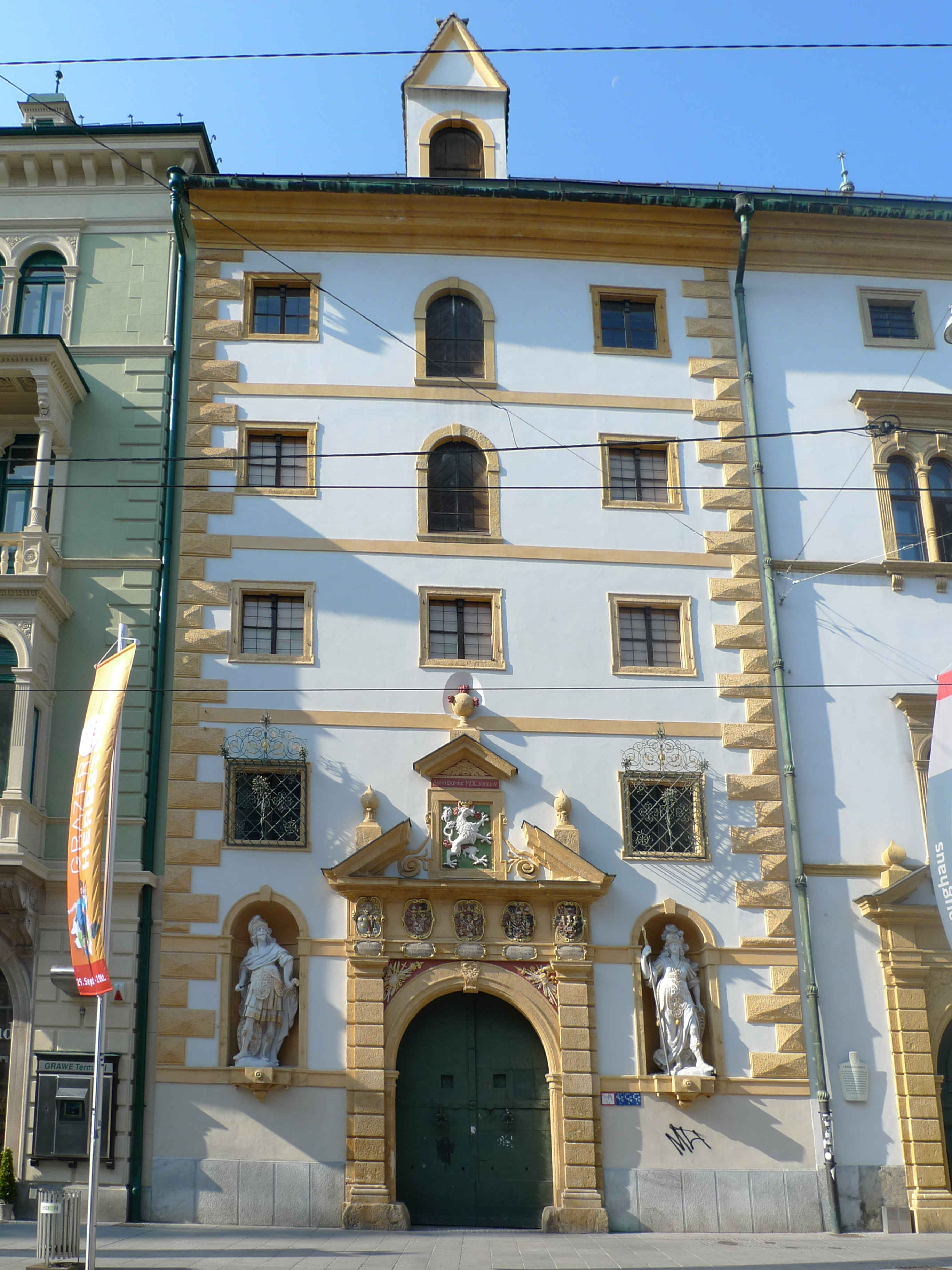 Landeszeughaus